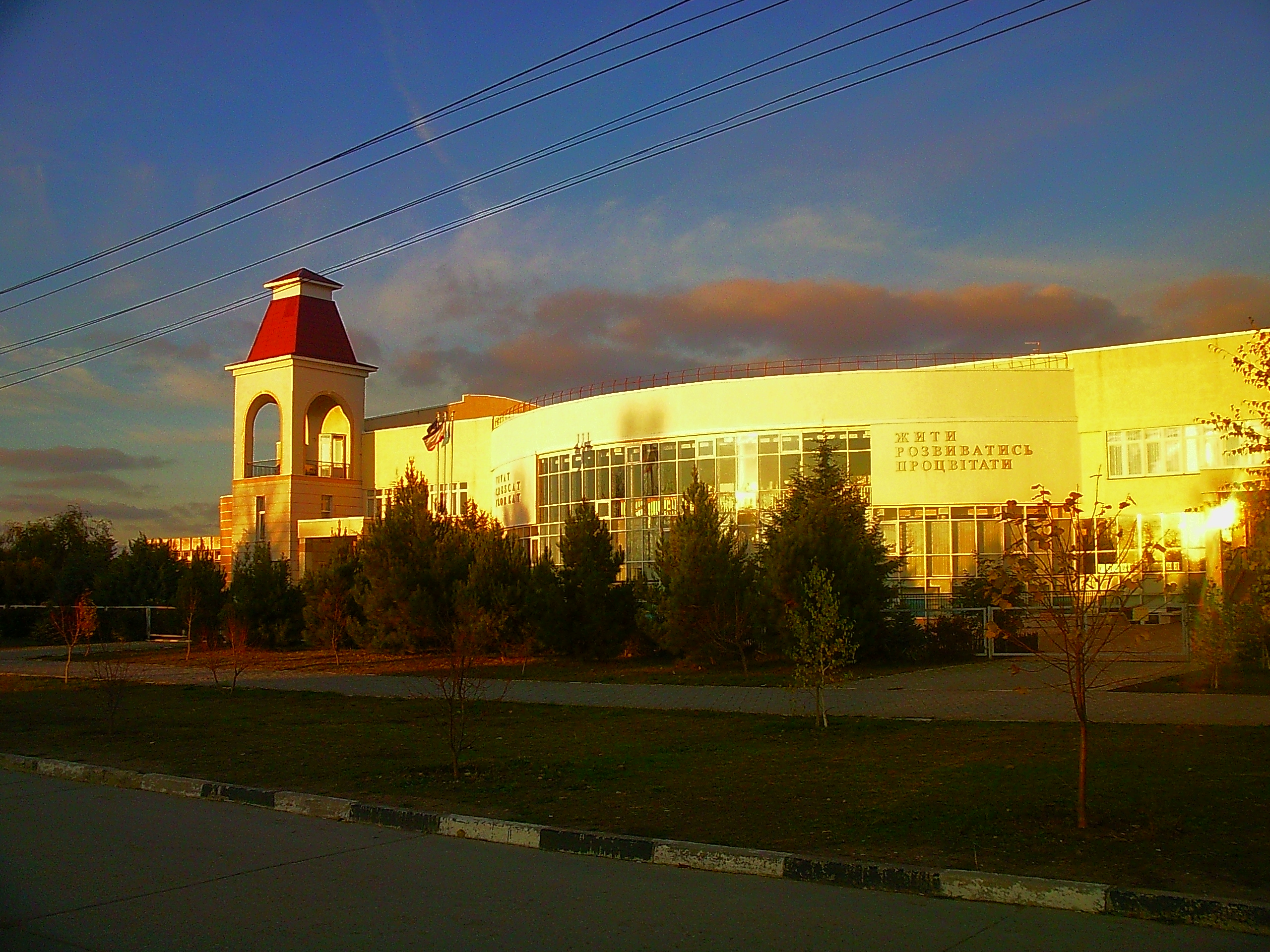 школа